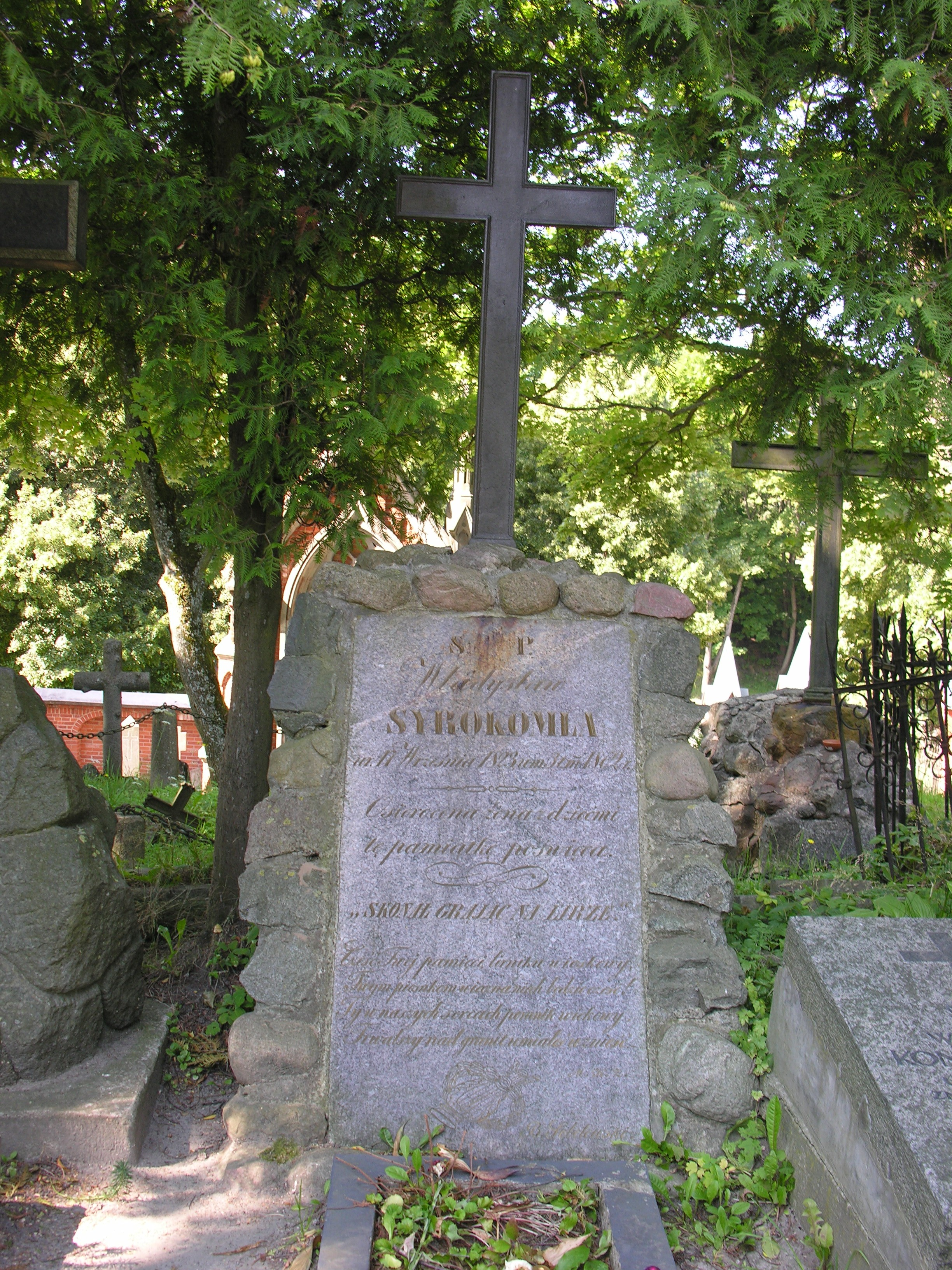 Grób Władysława Syrokomli